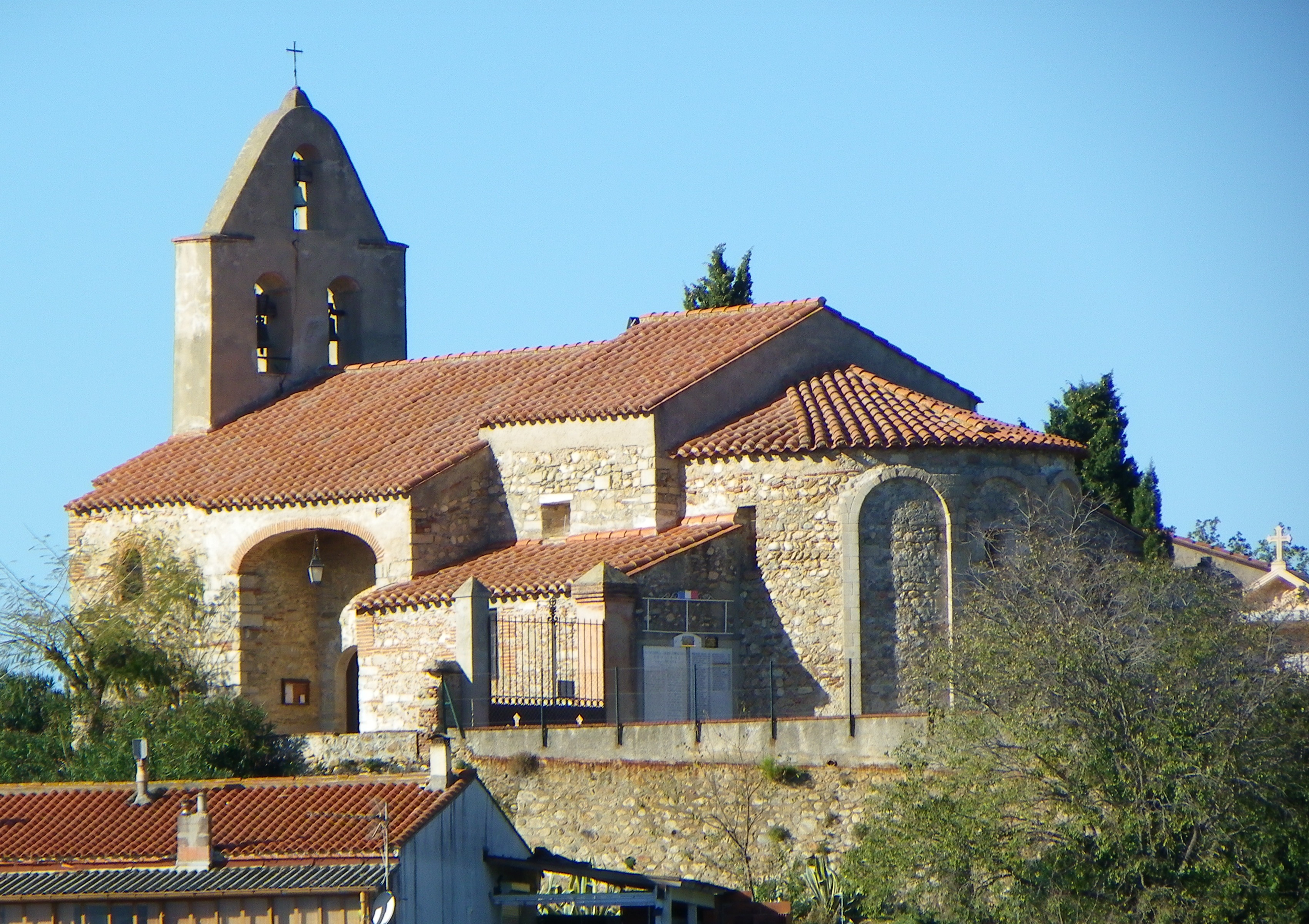 Église paroissiale Sainte-Eugénie située à Ortaffa 66560 .